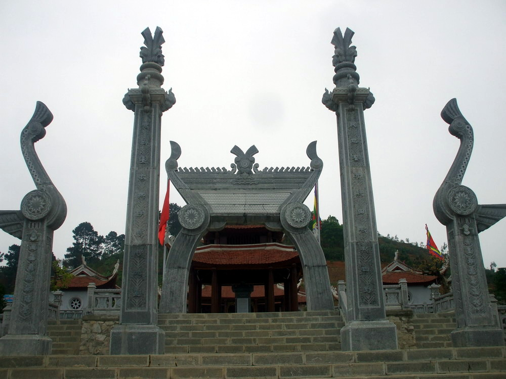 Đền thờ Lạc Long Quân tại đồi Sim, nằm trong quần thể di tích lịch sử đền Hùng (Chu Hóa, Việt Trì, Phú Thọ, Việt Nam).